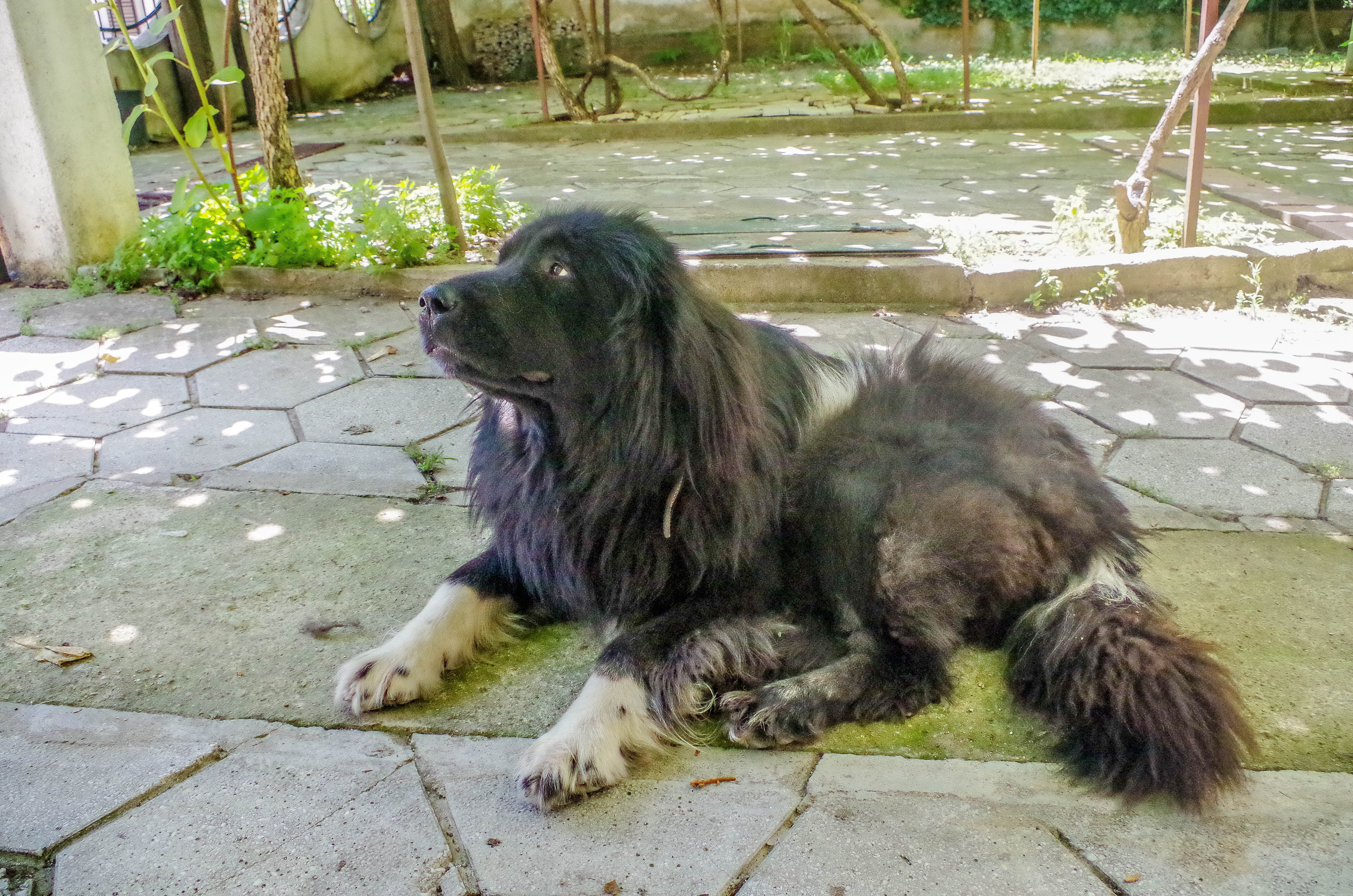 Karaman dog